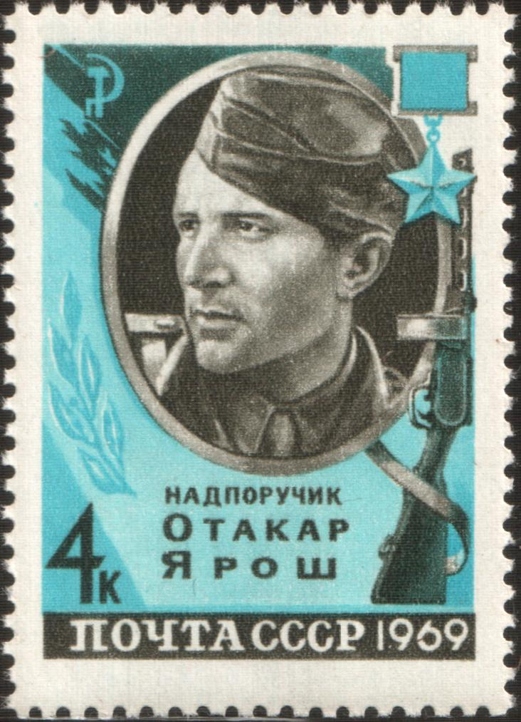 Герой Советского Союза Отакар Ярош